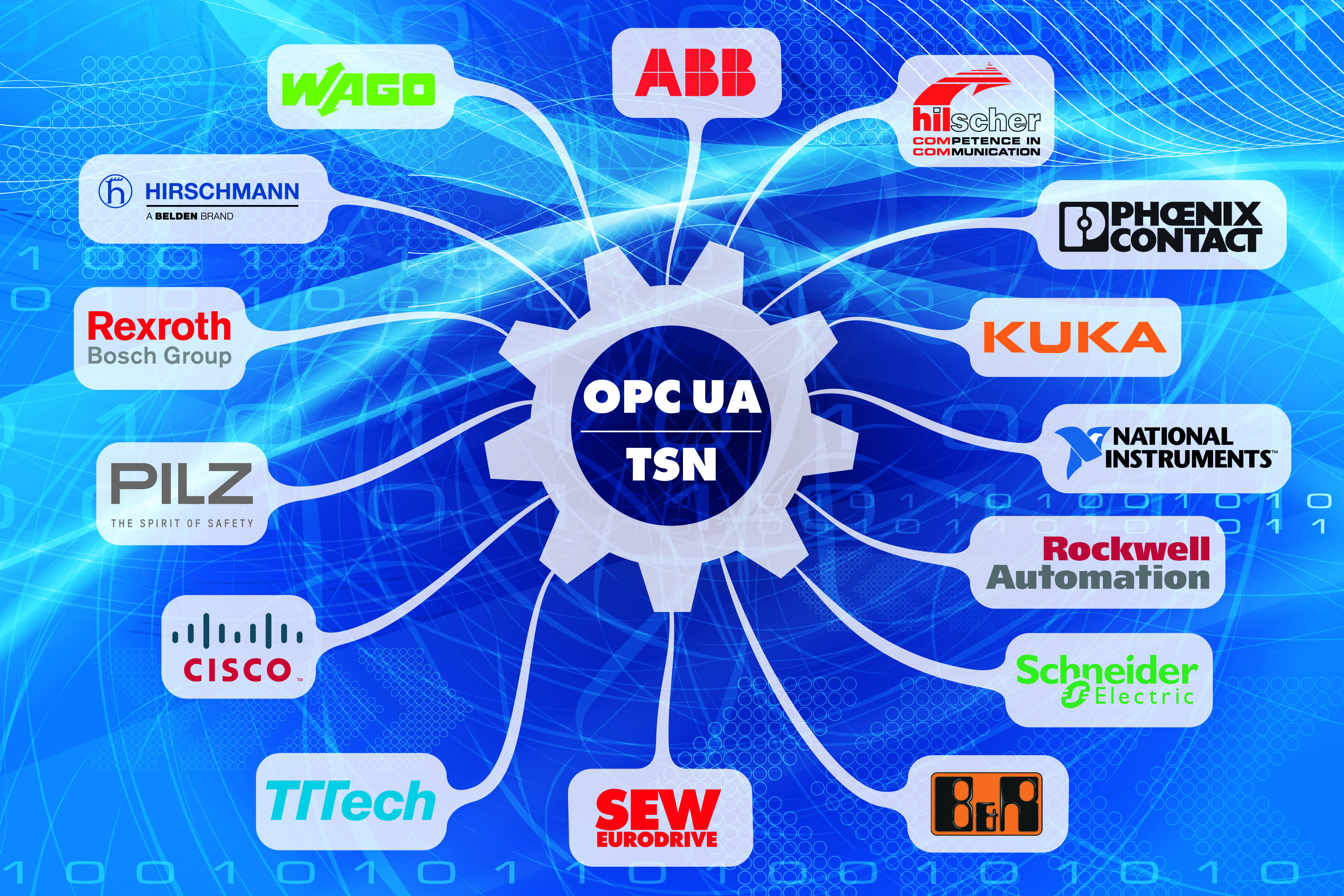 Industry group is collaborating to address real-time device-to-device and device-to-cloud applications